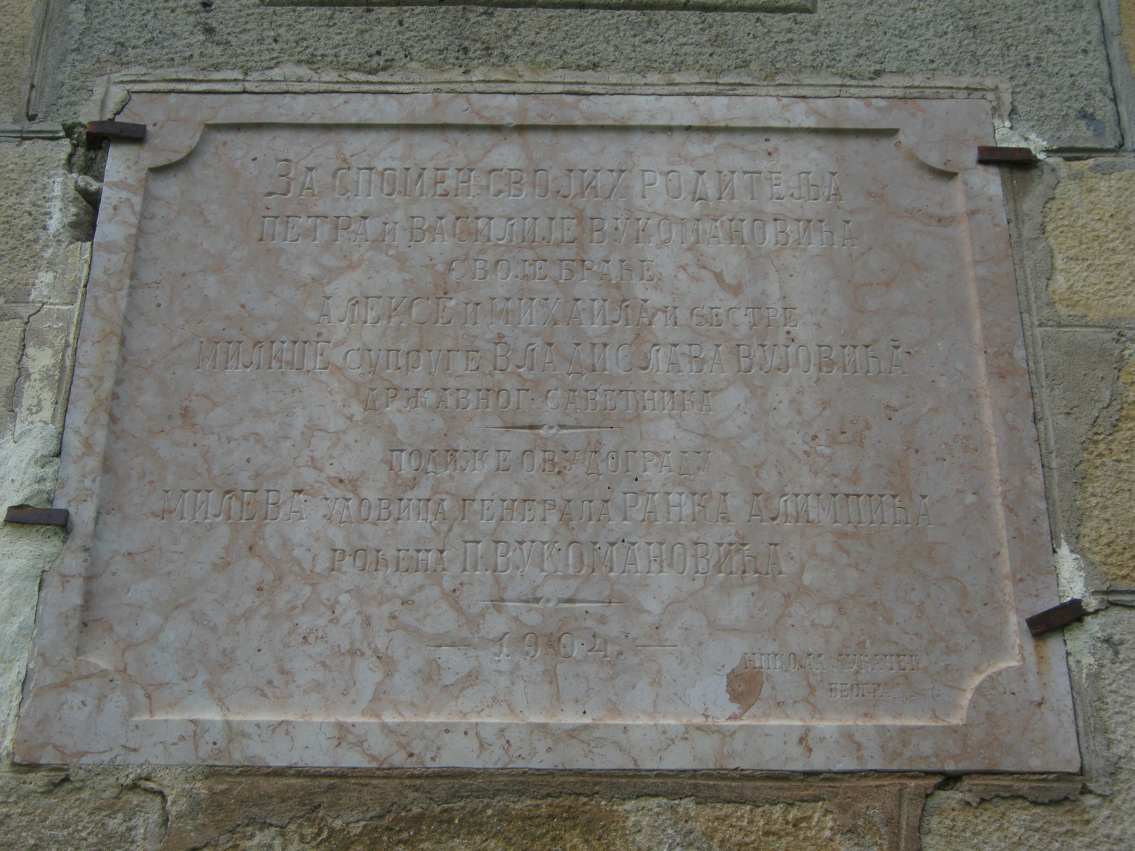 Детаљи из порте и са фасаде. Црква светог Саве на Савинцу је православна црква у Шаранима, епархија жичка, подигнута 1819. године и води се као споменик културе у категорији културно добро од великог значаја. Њен ктитор је кнез Милош Обреновић. Цркву је кнез Милош саградио у знак захвалности за победу на Љубићу.